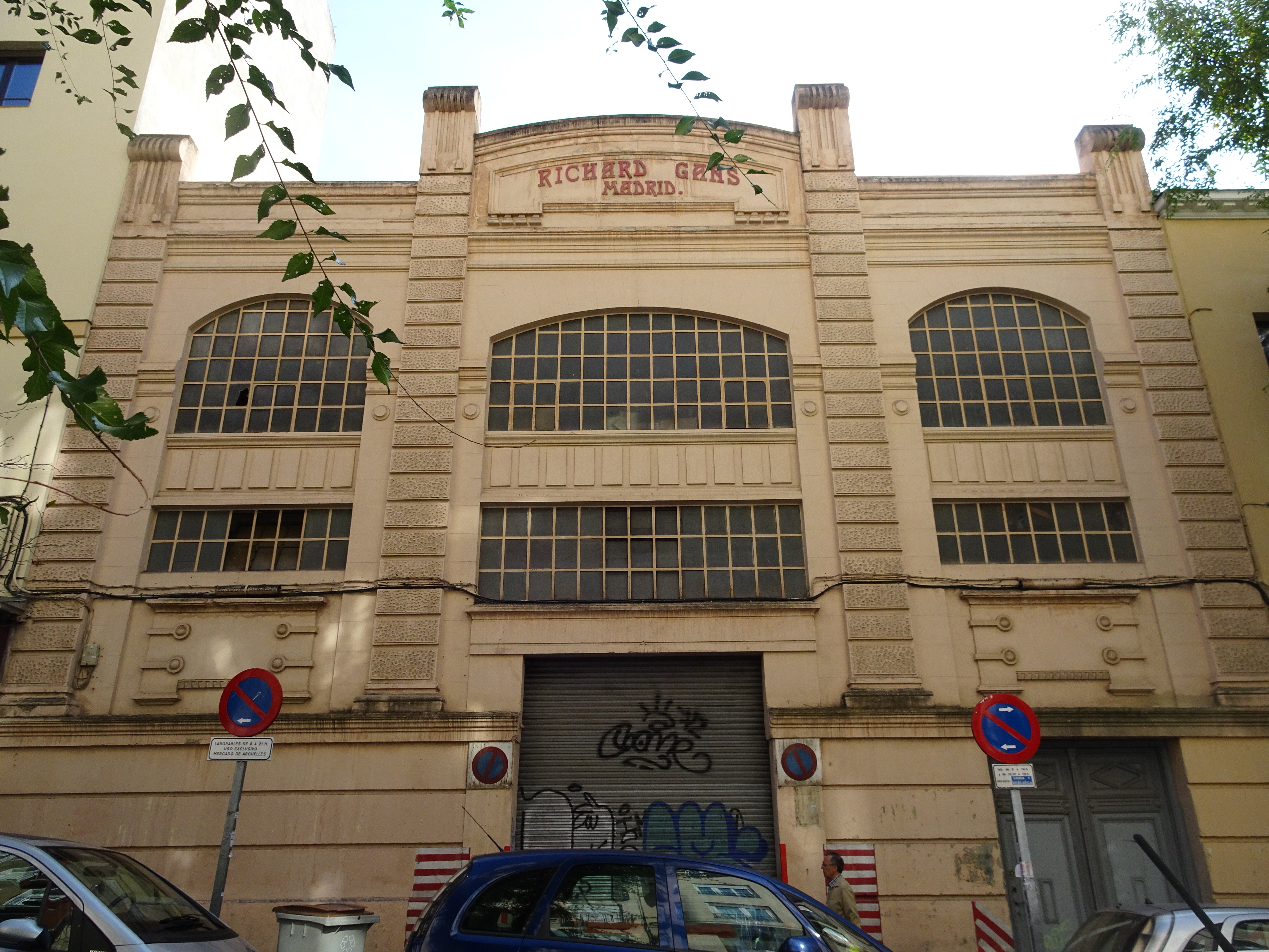 Imprenta y fundición tipográfica Richard Gans